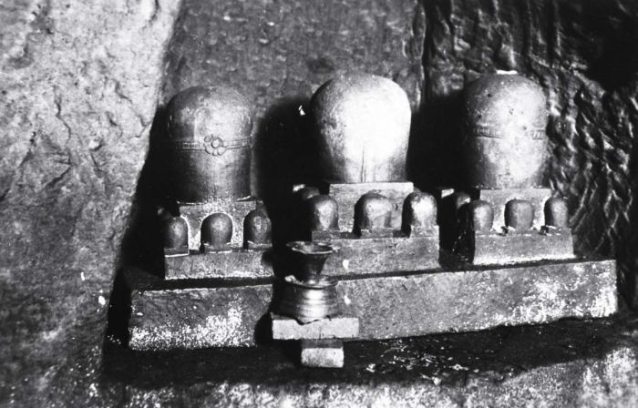 Foto. Voorouderstenen in de Olifanten-grot